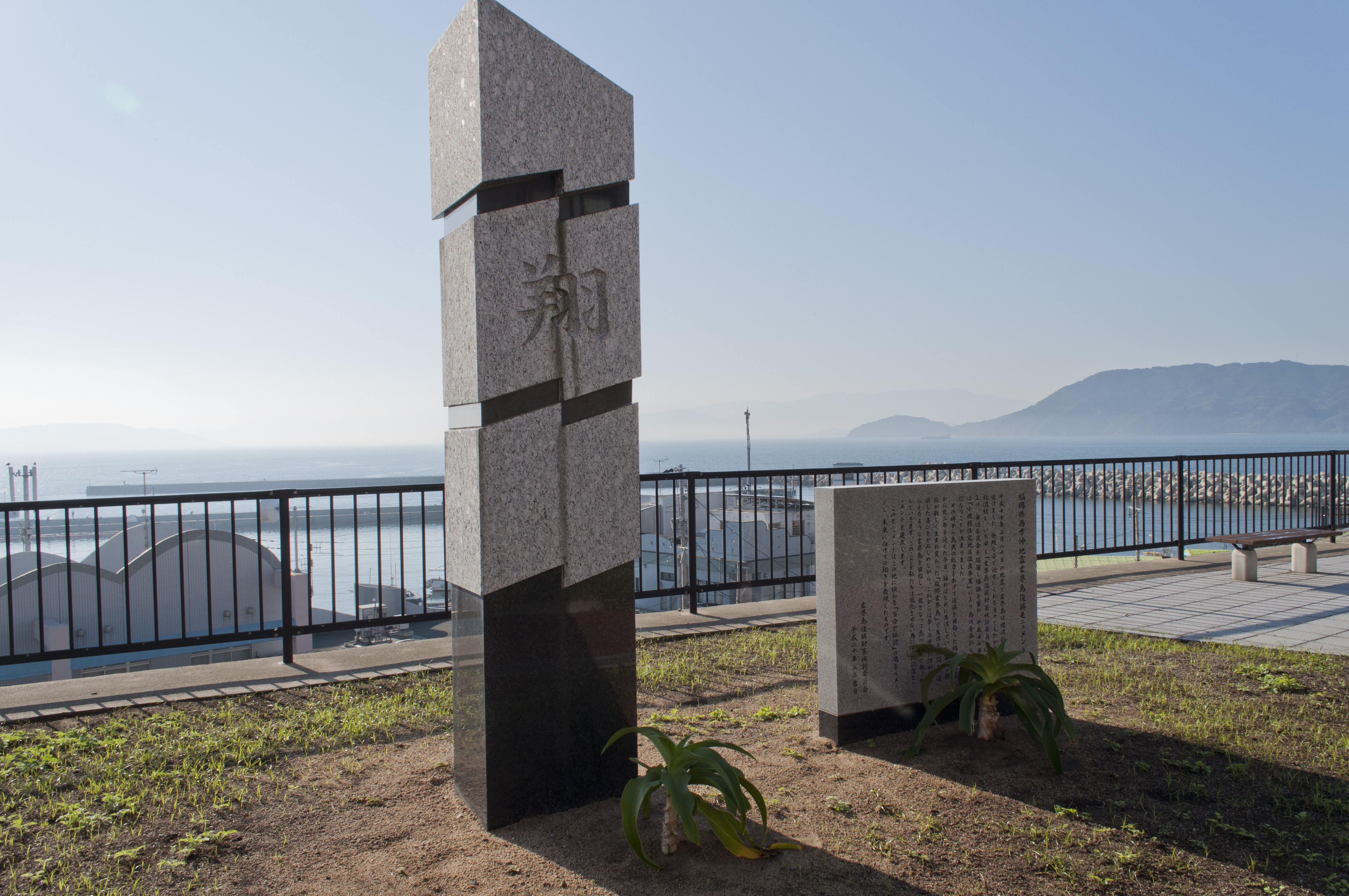 玄界島の震災復興モニュメント